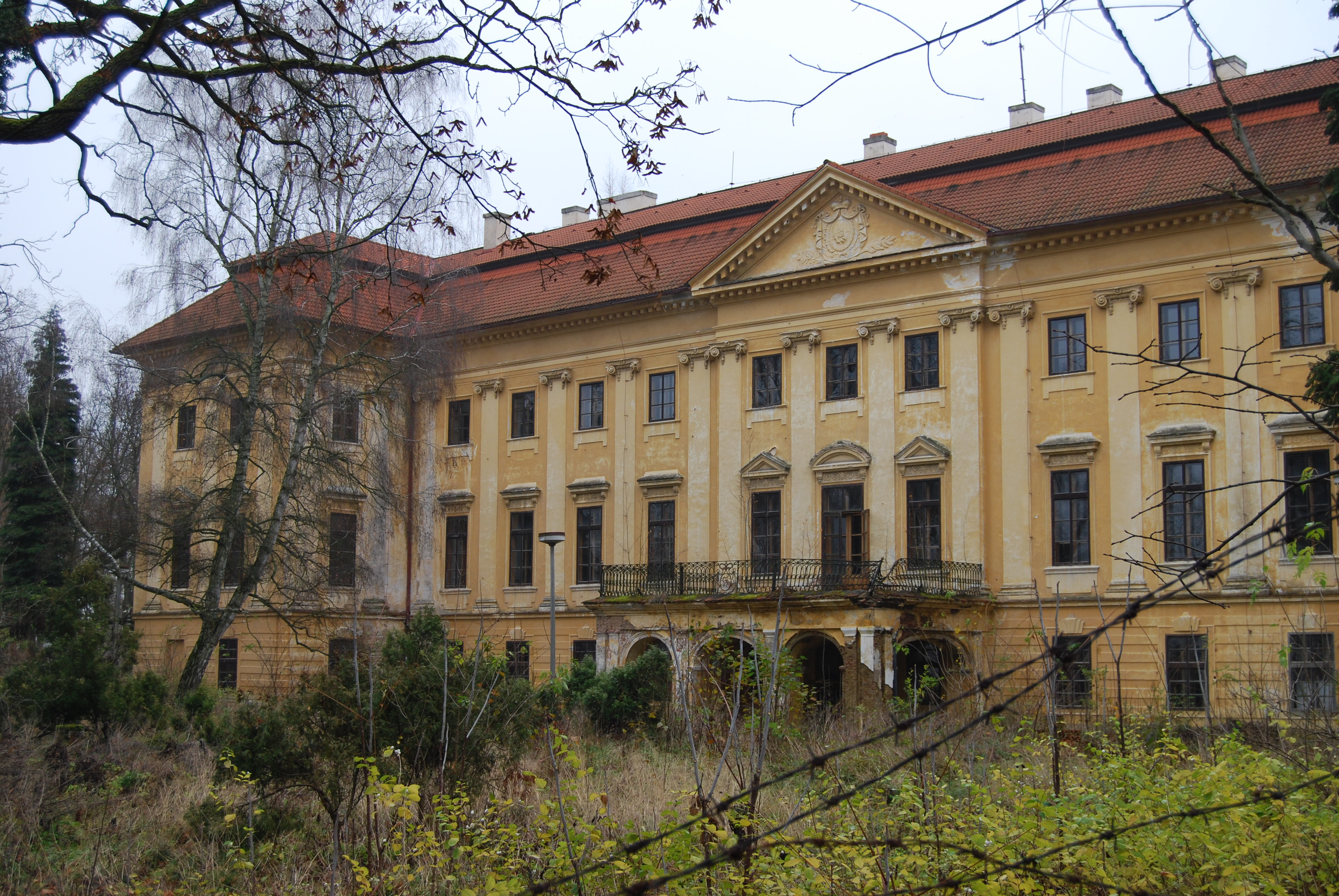 Nový zámek Libějovice. Libějovice se nachází v okrese Strakonice v Jihočeském kraji. Česká republika. - OpenStreetMap (Info)